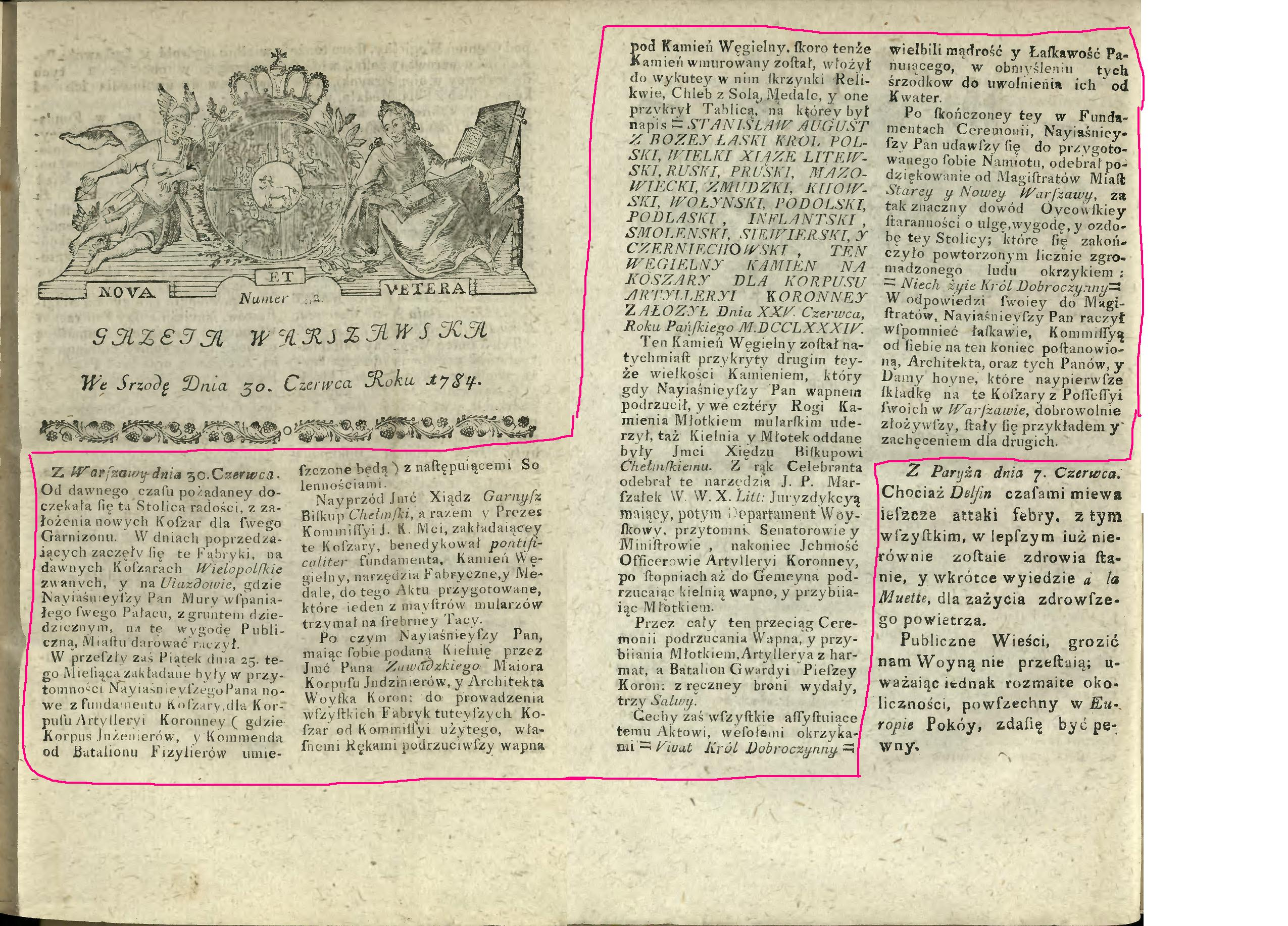 Gazeta Warszawska. 1784, nr 52 "News" prasowy z okoliczności wmurowania kamienia węgielnego pod koszary